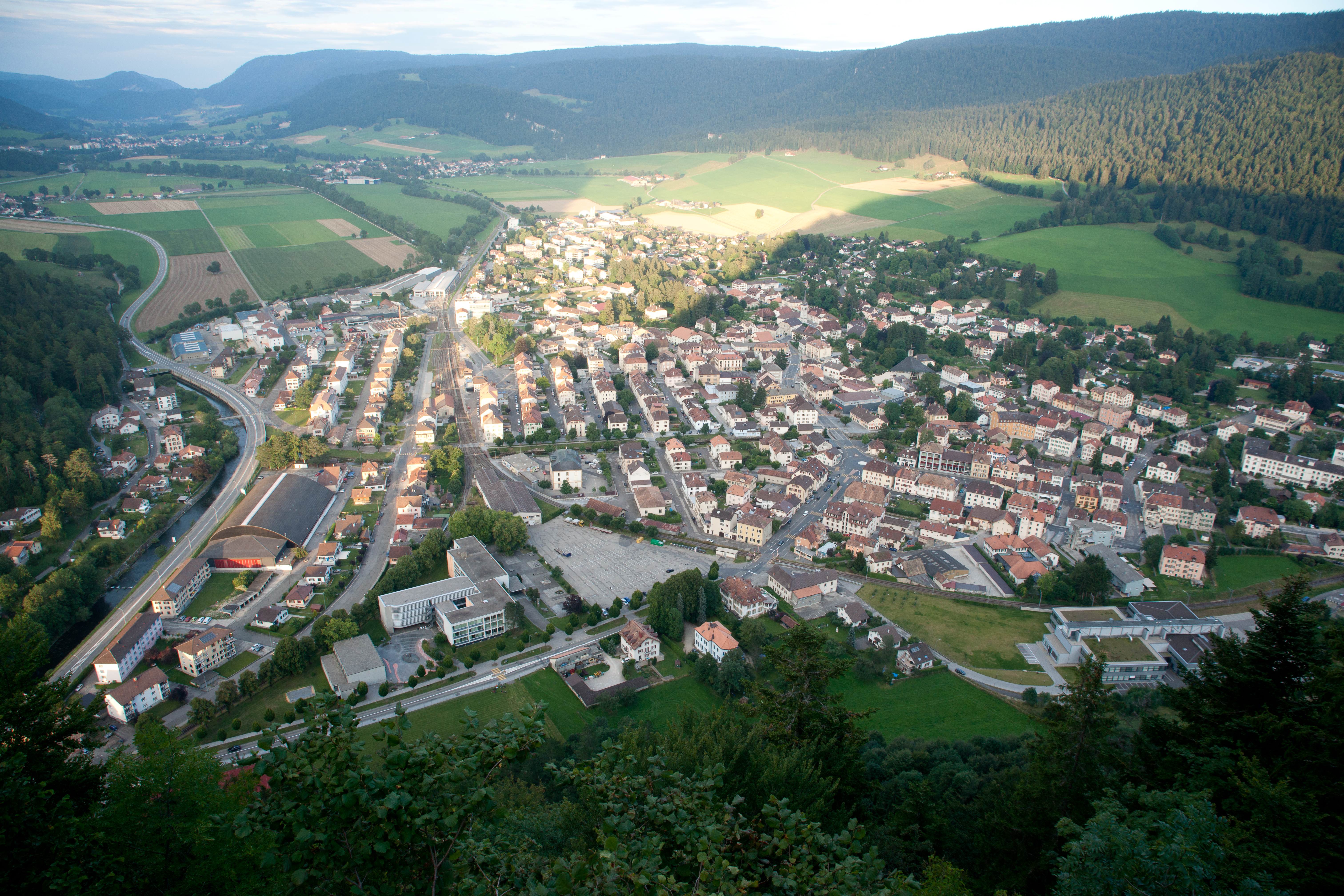 Fleurier depuis le chapeau de Napoléon